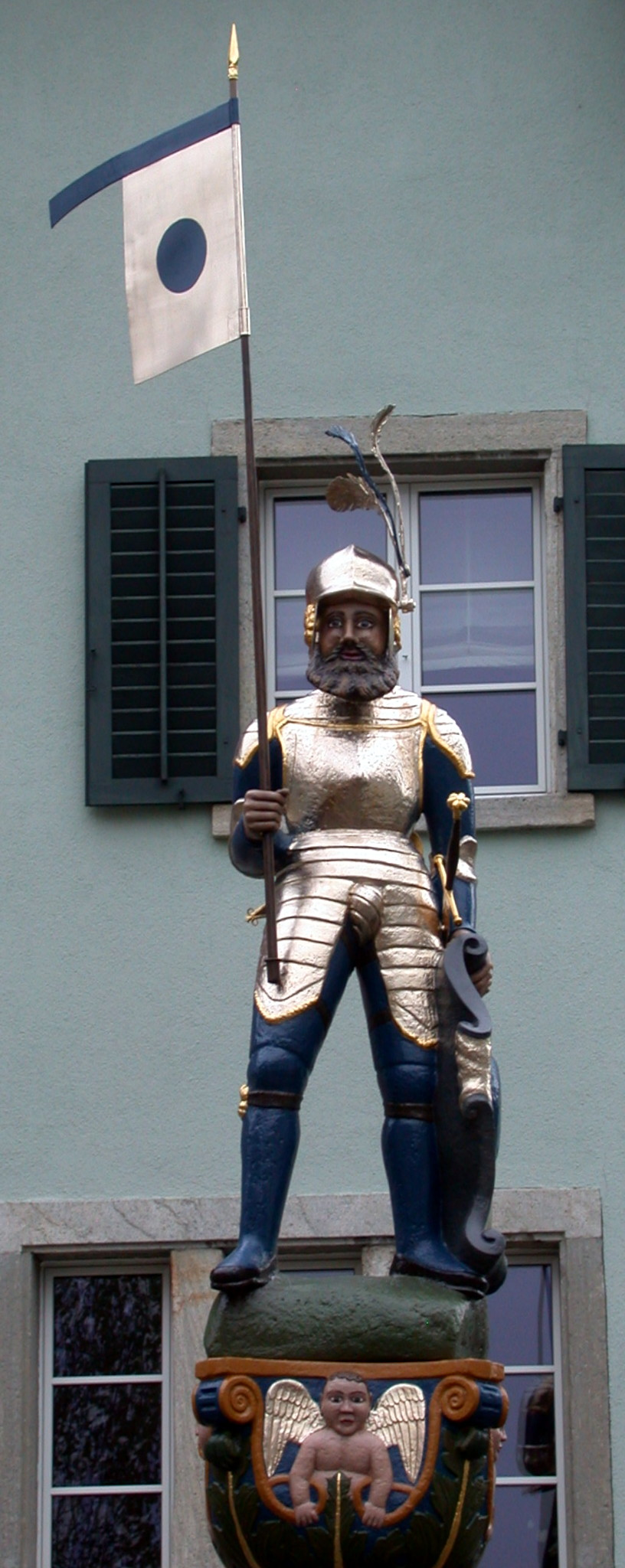 Brunnenfigur Klausbrunnen Lenzburg